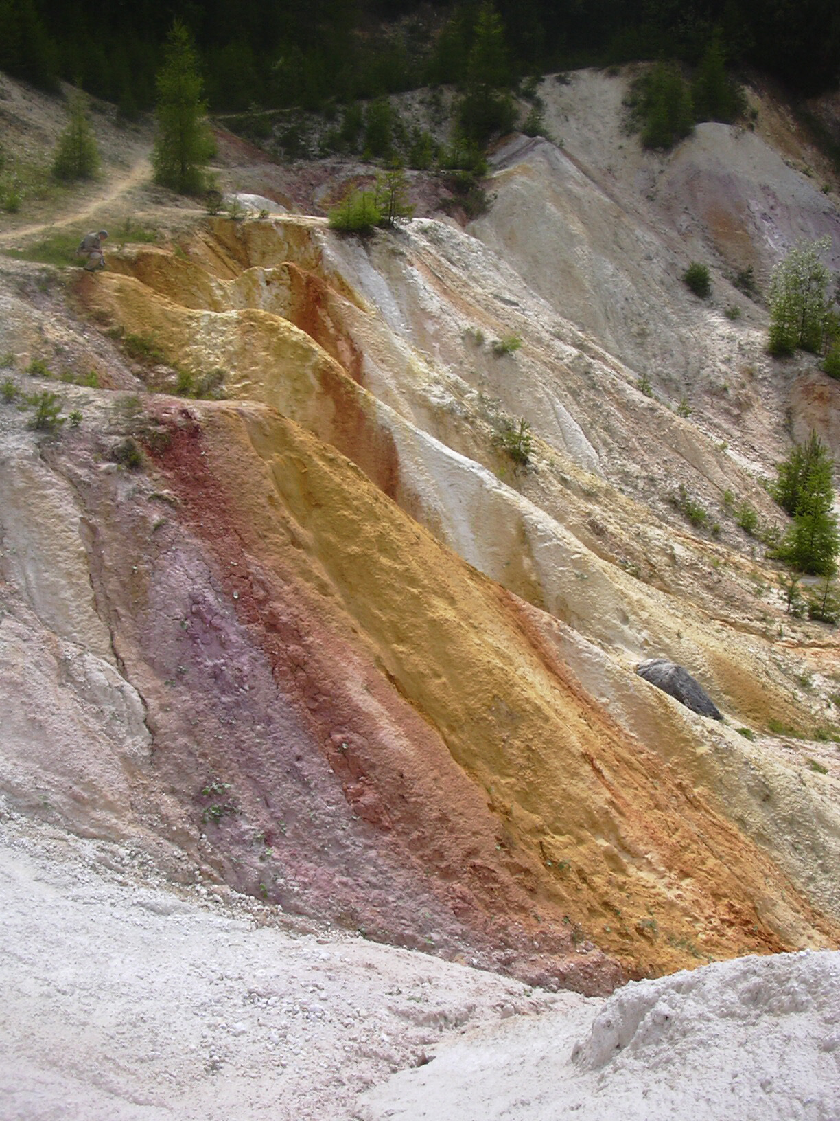 Žegrov - Rudice (Blansko District - Czech republic)